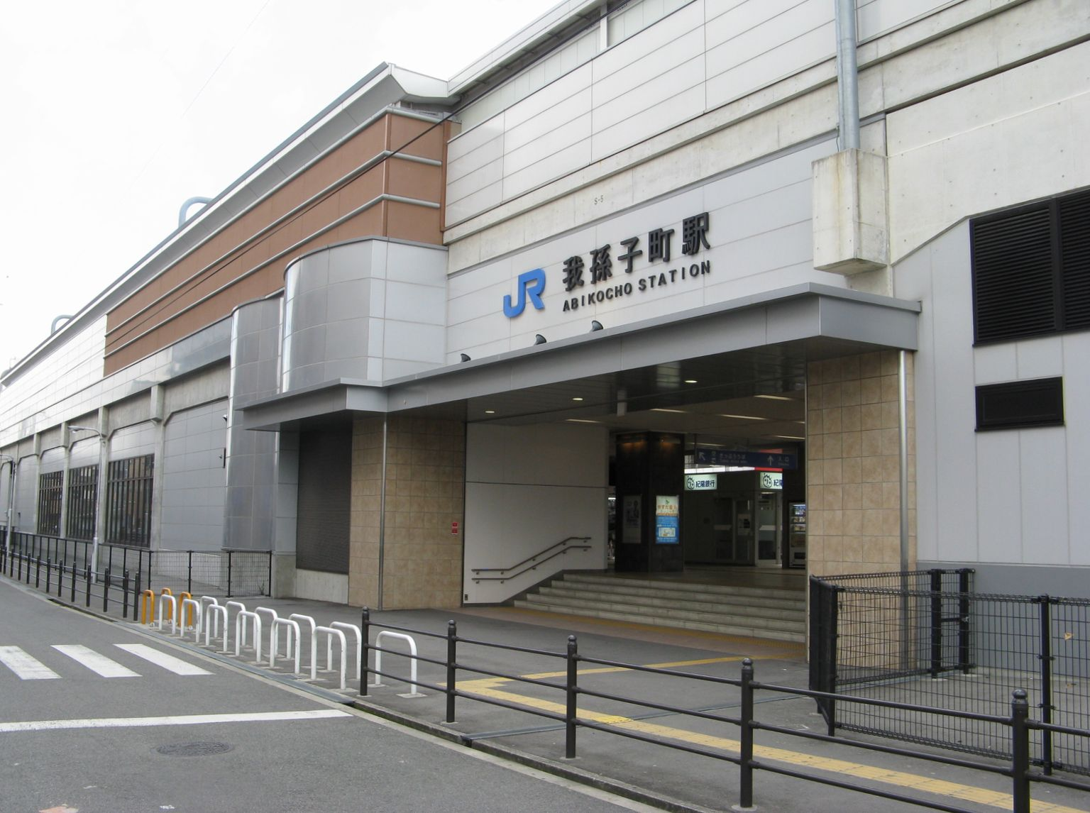 阪和線我孫子町駅